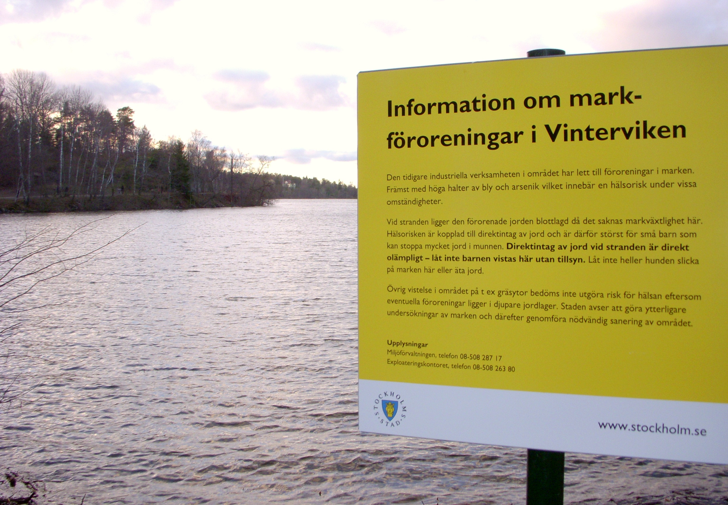 Varningsskylt om förorenad mark vid Vinterviken